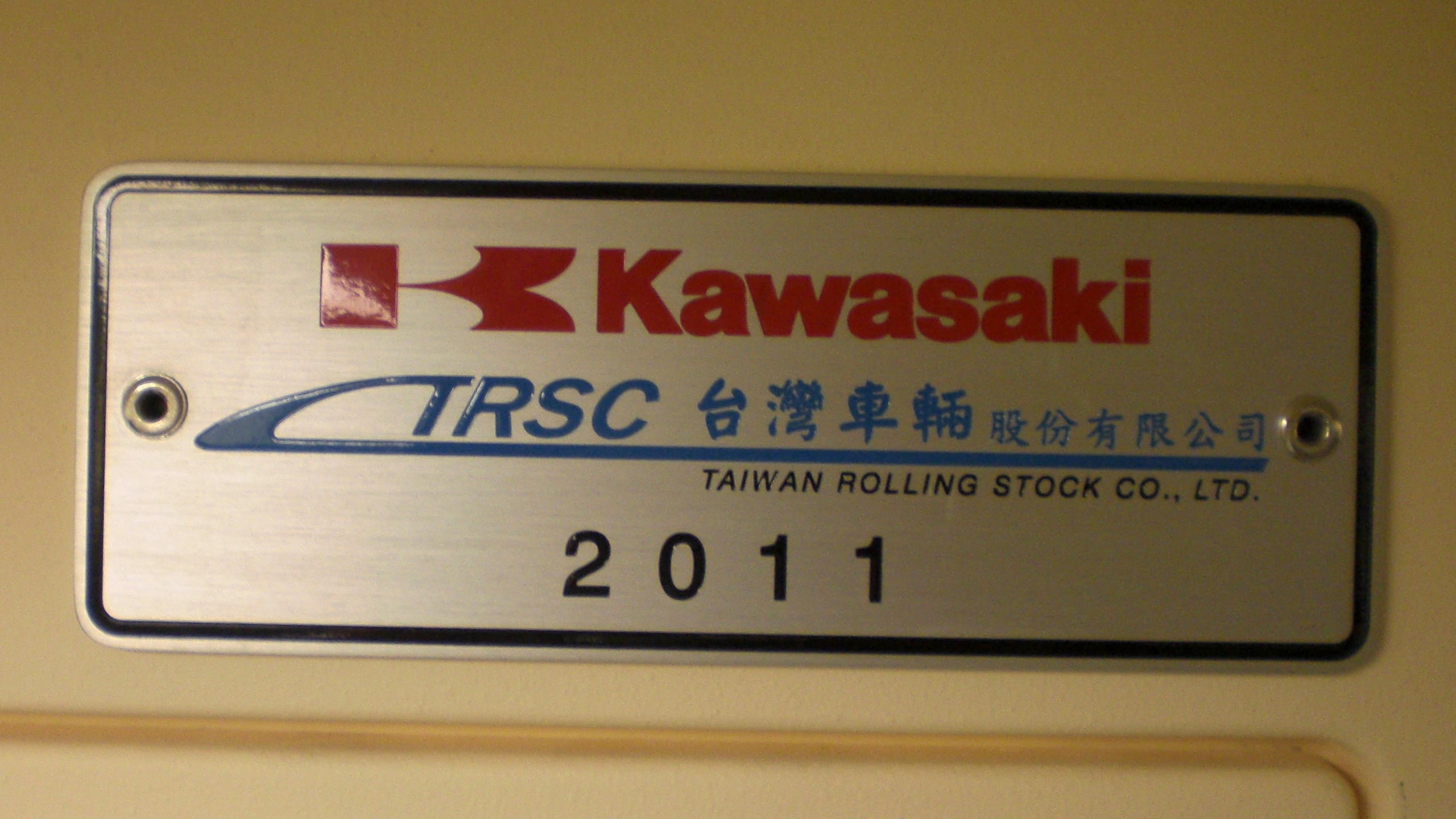 台北捷運381型電聯車1526車廂內的川崎重工與台灣車輛銘板